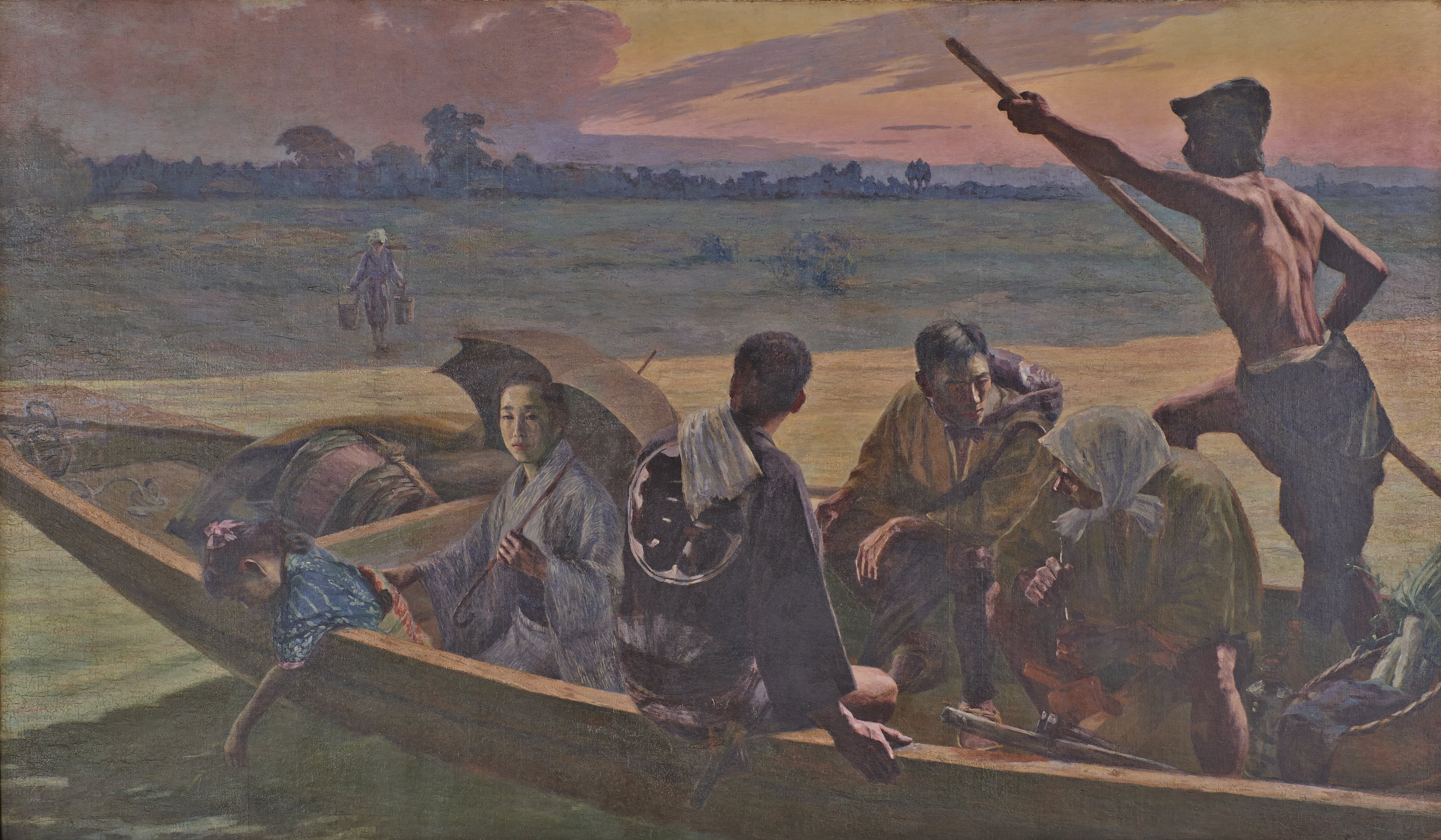 Ferry Boat by Kobayashi Mango タイトル:渡舟 ライセンス:パブリックドメイン-年 出展元:香川県文化会館 製作者:小林萬吾